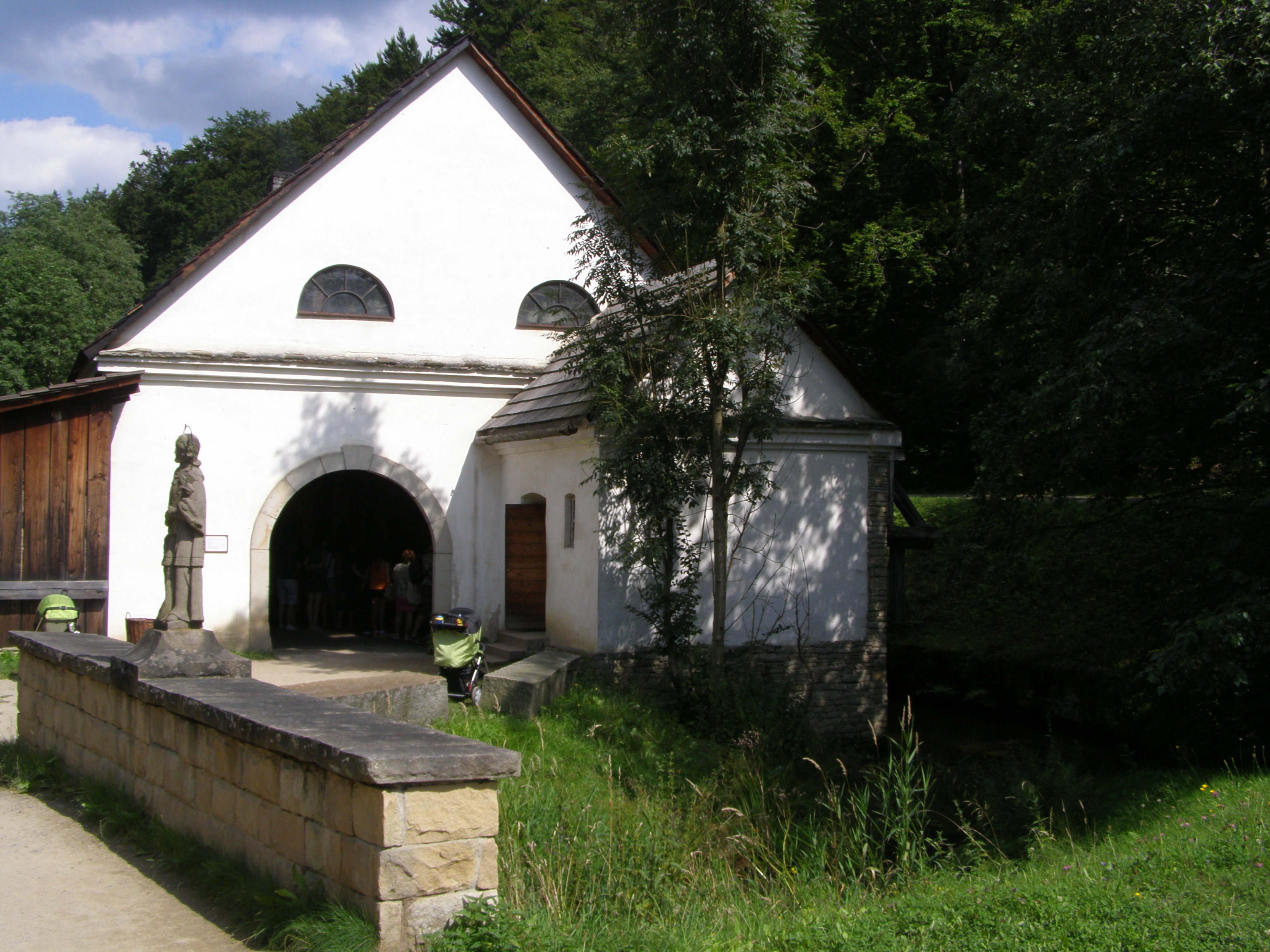 Rožnov pod Radhoštěm, Valašské muzeum v přírodě, Mlýnská dolina, hamr z Ostravice